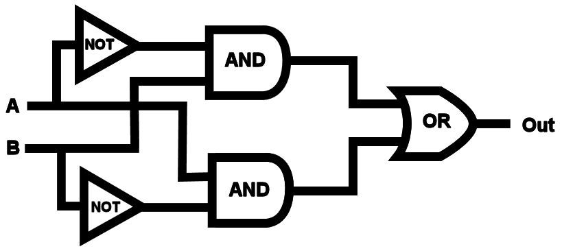 Overzicht van een XOR-poort.